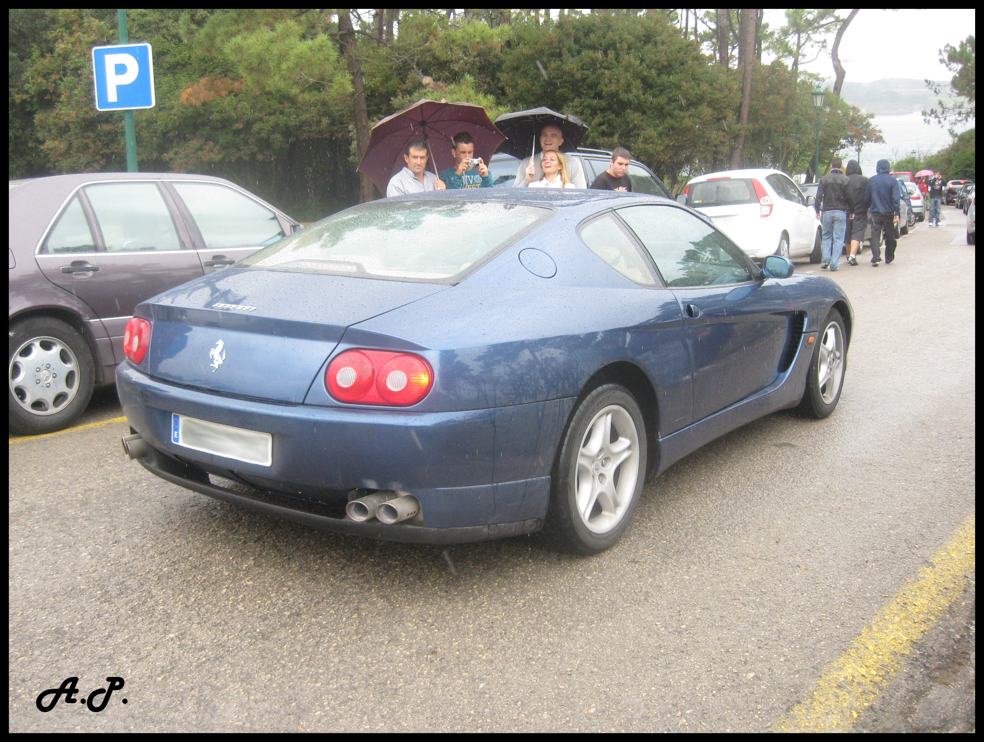 Seen in "La Magdalena" Santander (Cantabria).